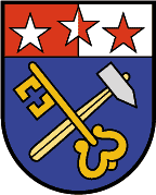 Silbertal, Vorarlberg: In blauem Schild ein goldener Schlüssel gekreuzt mit einem silbernen Hammer. Das Schildhaupt ist von Rot und Weiß gespalten und mit drei fünfzackigen Sternen in wechselnden Farben belegt. (Verleihung: 12. Mai 1964)